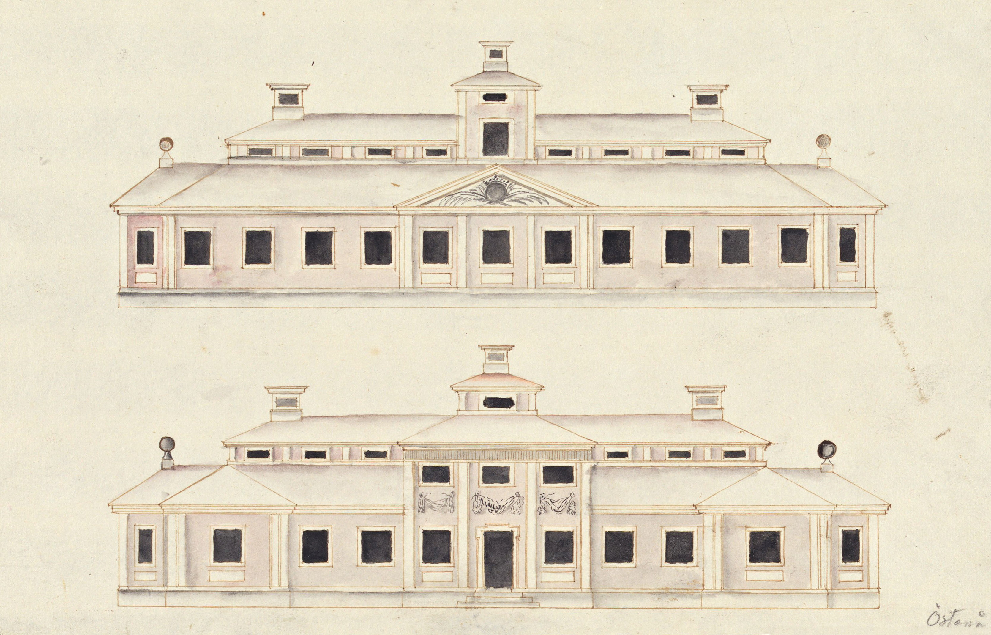 Östanå slott, fasadritning